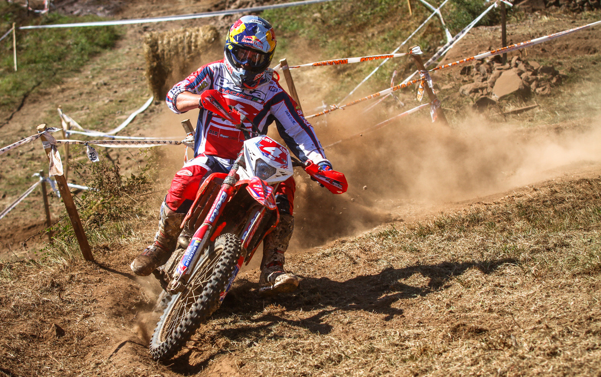 le pilote moto Johnny AUbert lors de la finale du championnat du monde d'enduro 2014 à Brioude - photo